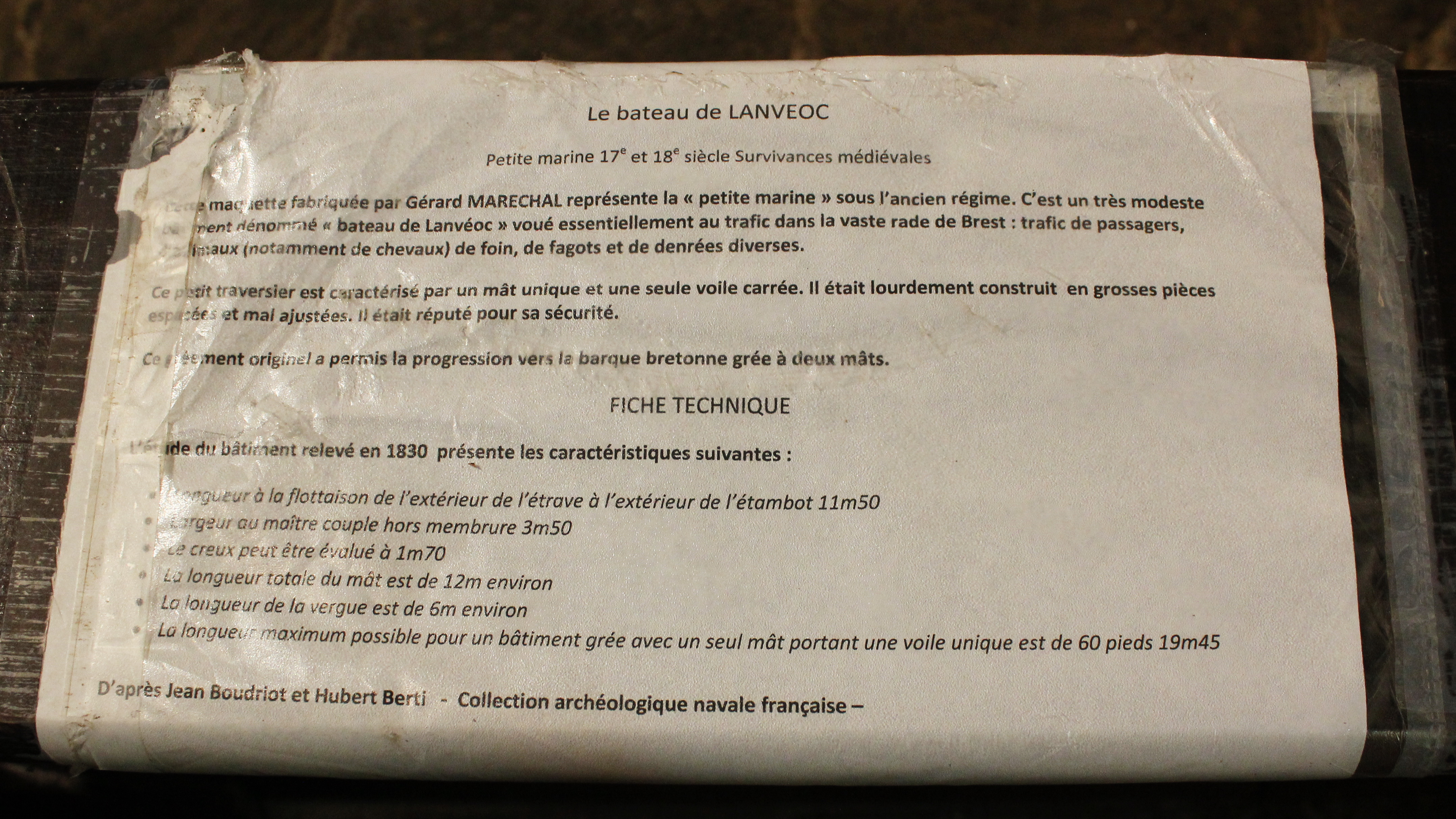 Le bateau de Lanvéoc, fiche explicative